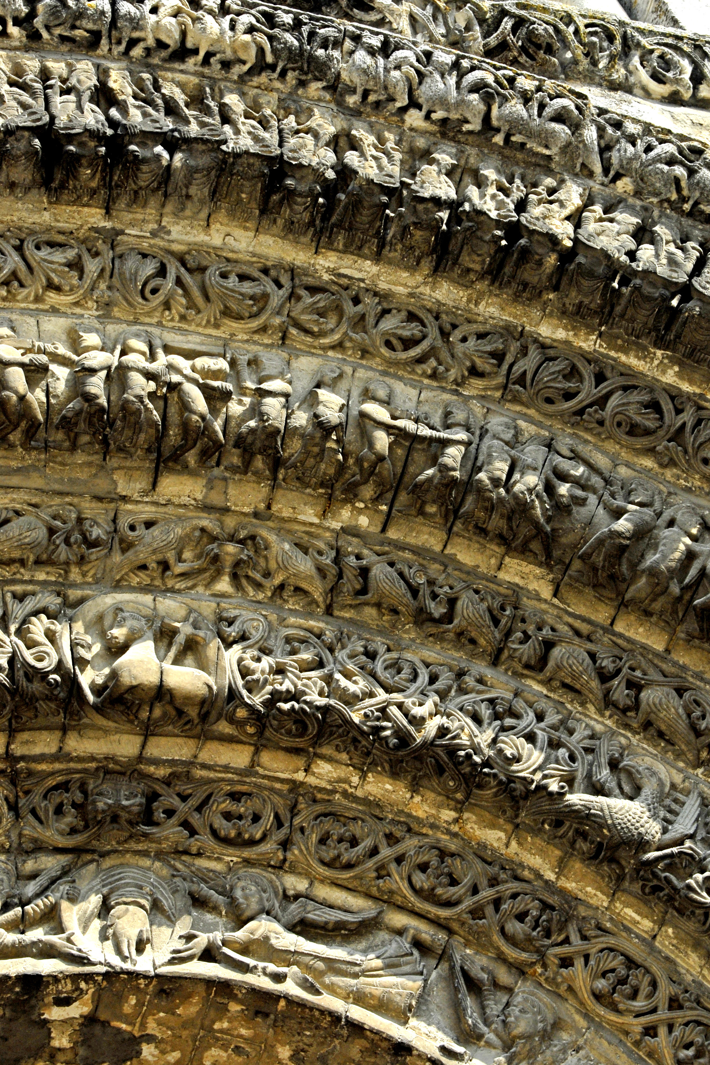 Abbaye aux Dames Saintes, Abteikirche, Archivolte Hauptportal, Scheitel